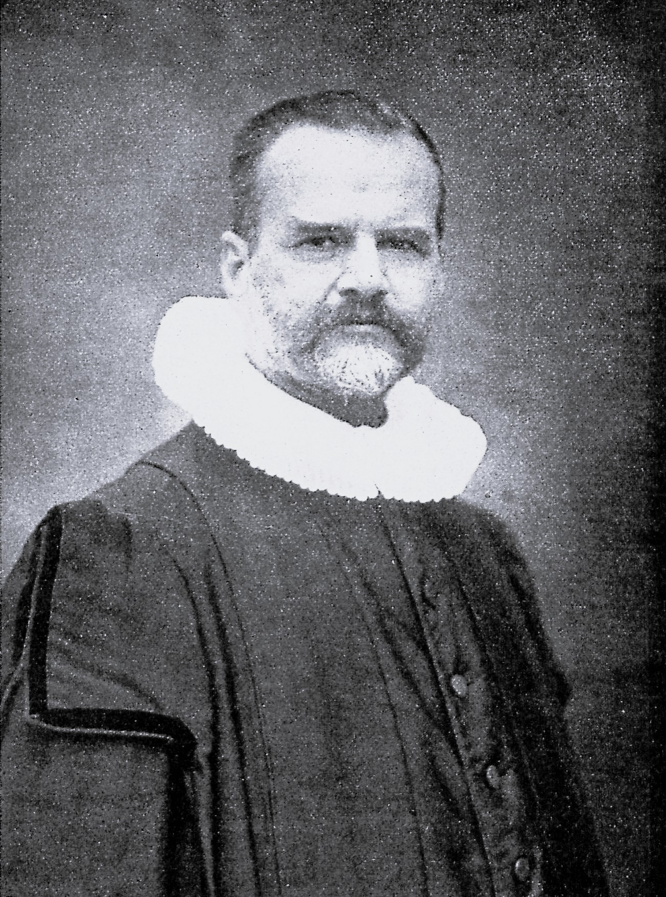 Senior Hauptpastor Johs. Becker